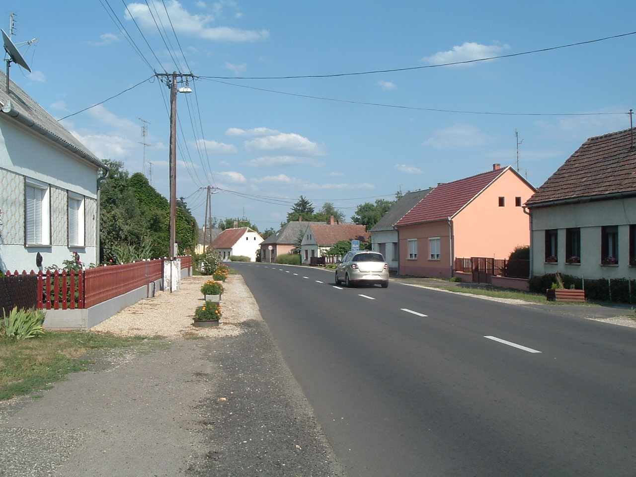 Vasszentmihály